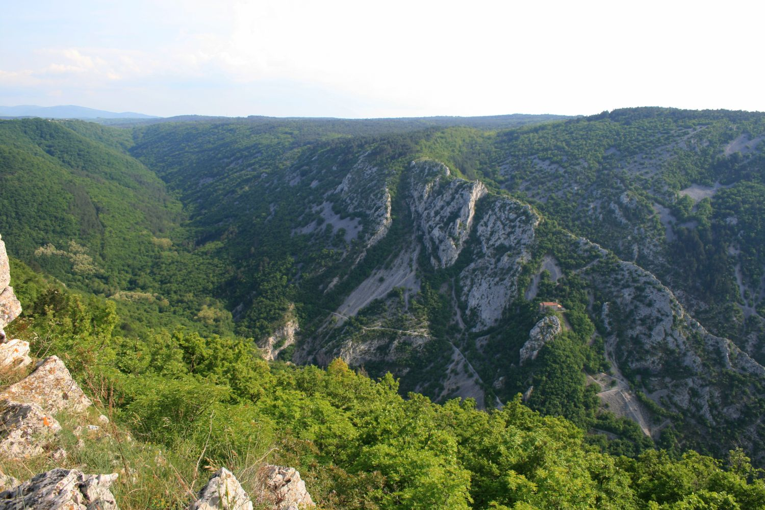 Italien/Italia/Italy: Friuli-Venezia Giulia, Prov. Trieste, Val Rosandra/Dolina Glinščice, von Monte Stena aus